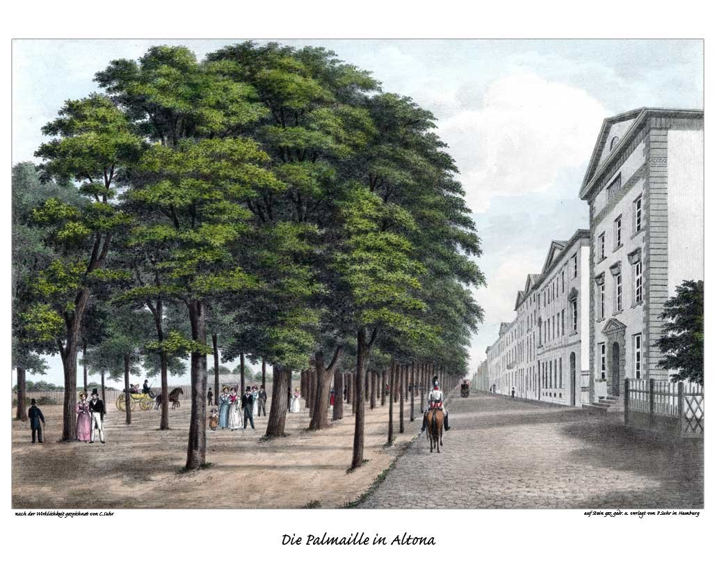 Die Palmaille in Altona, gezeichnet von Christoffer Suhr, Litho von Peter Suhr